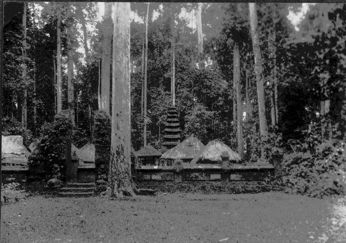 Foto. Tempelcomplex bij het het heilige apenbos van Sangeh.